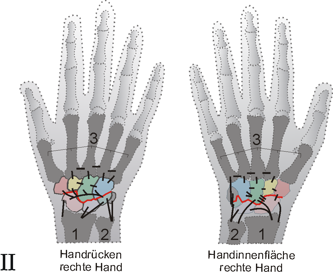 Handgelenk Schema Bänder